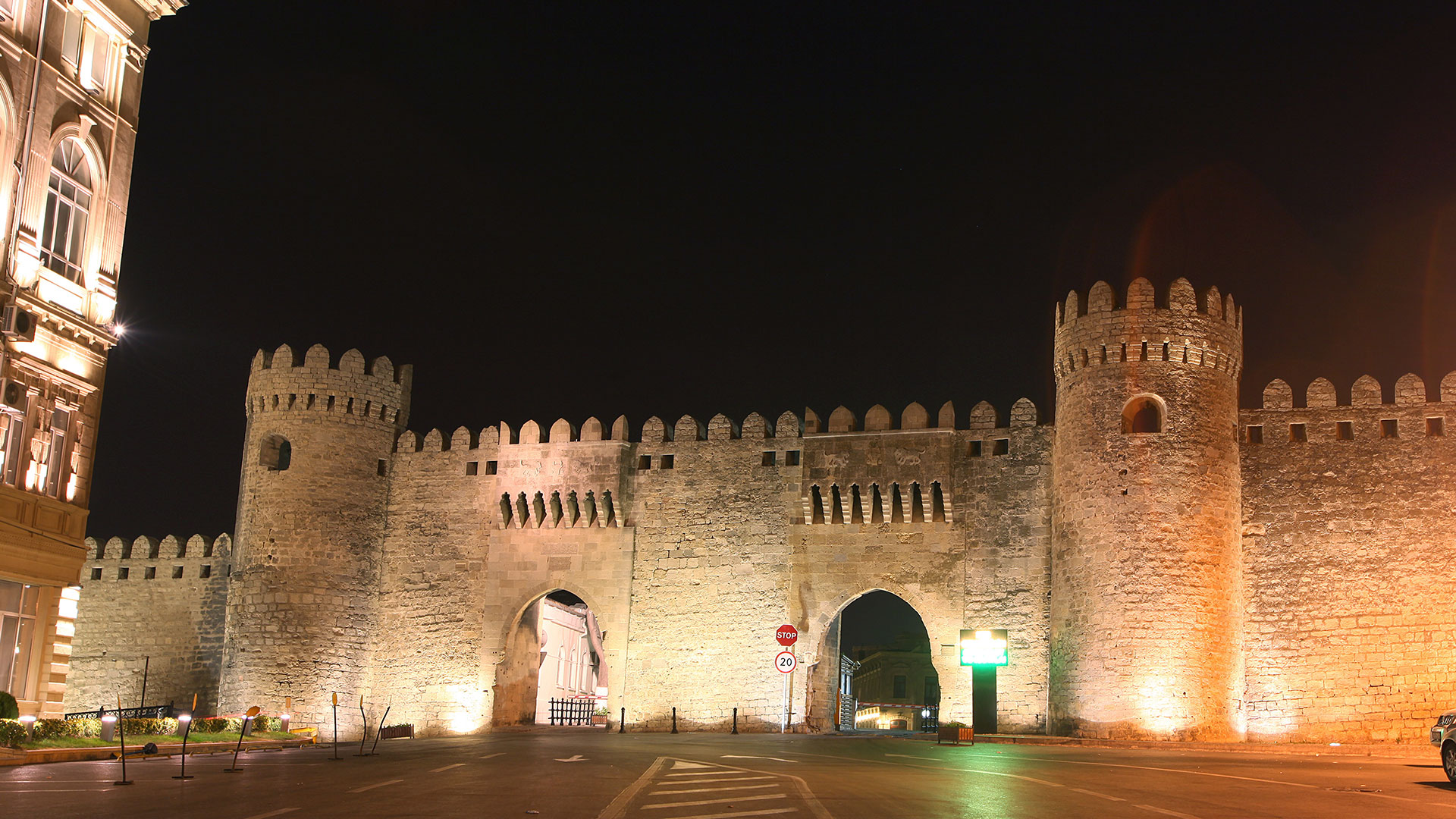 İçərişəhər